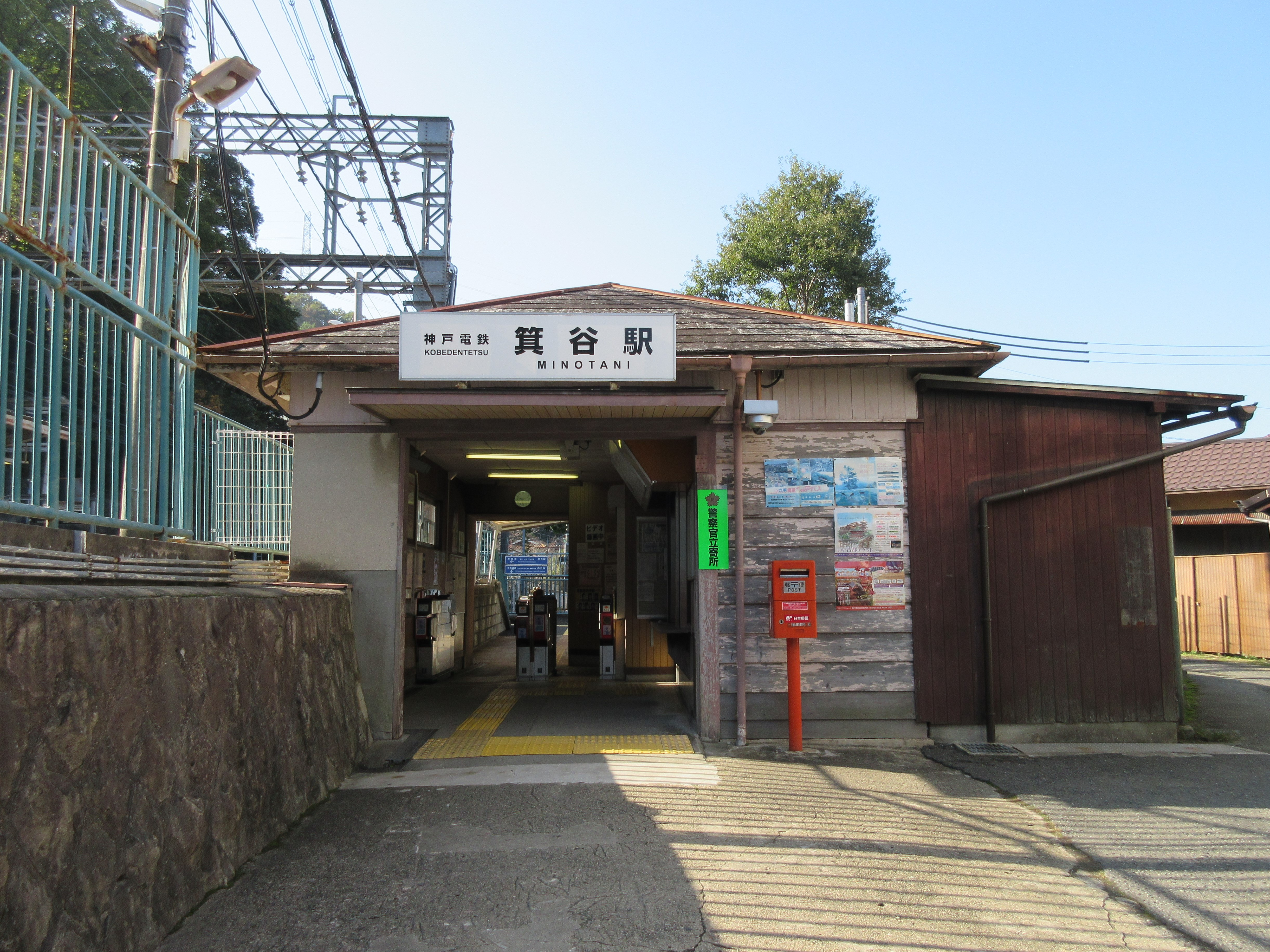 神戸電鉄箕谷駅